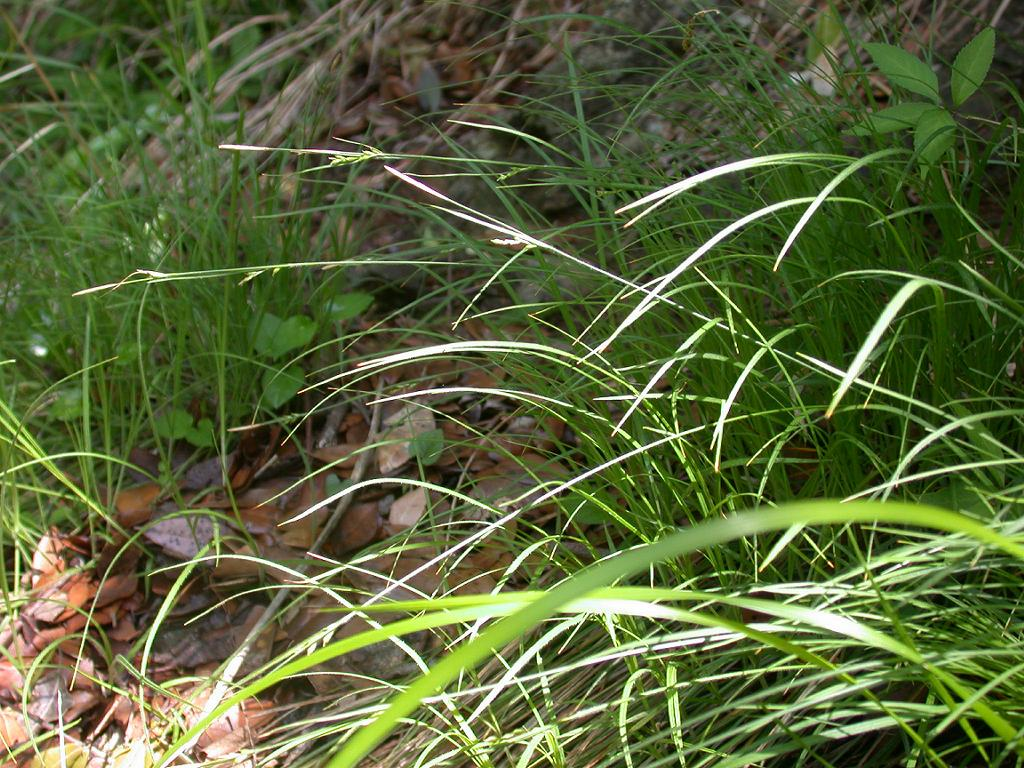 2004/05/06 和歌山県海南市：Kainan City. Wakayama Pref. Japan